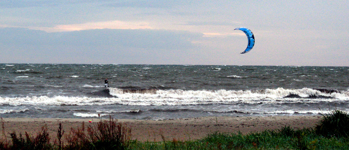 Kitesurfare vid Marinan i Ystad.